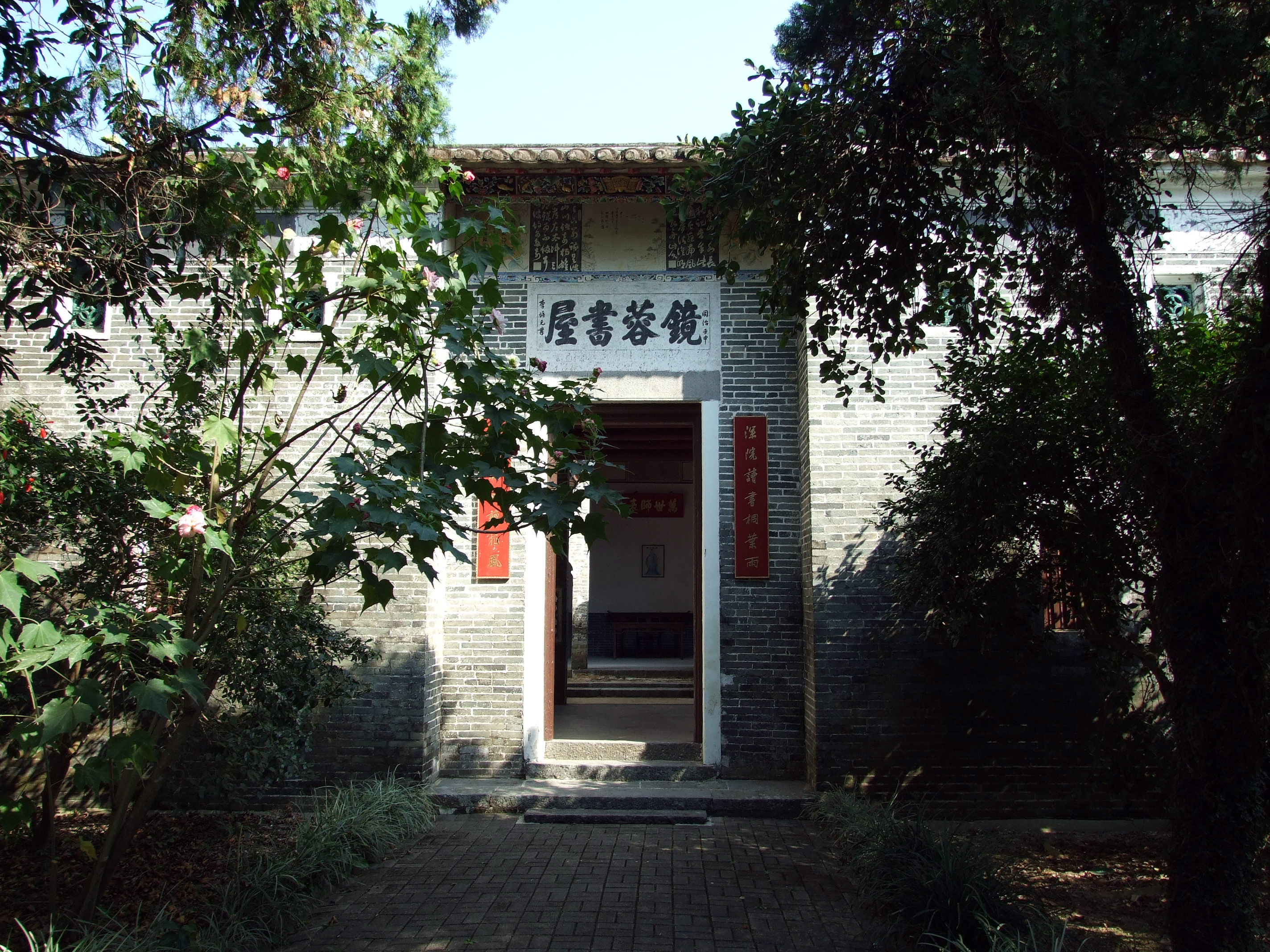 中文（香港）: 鏡蓉書屋